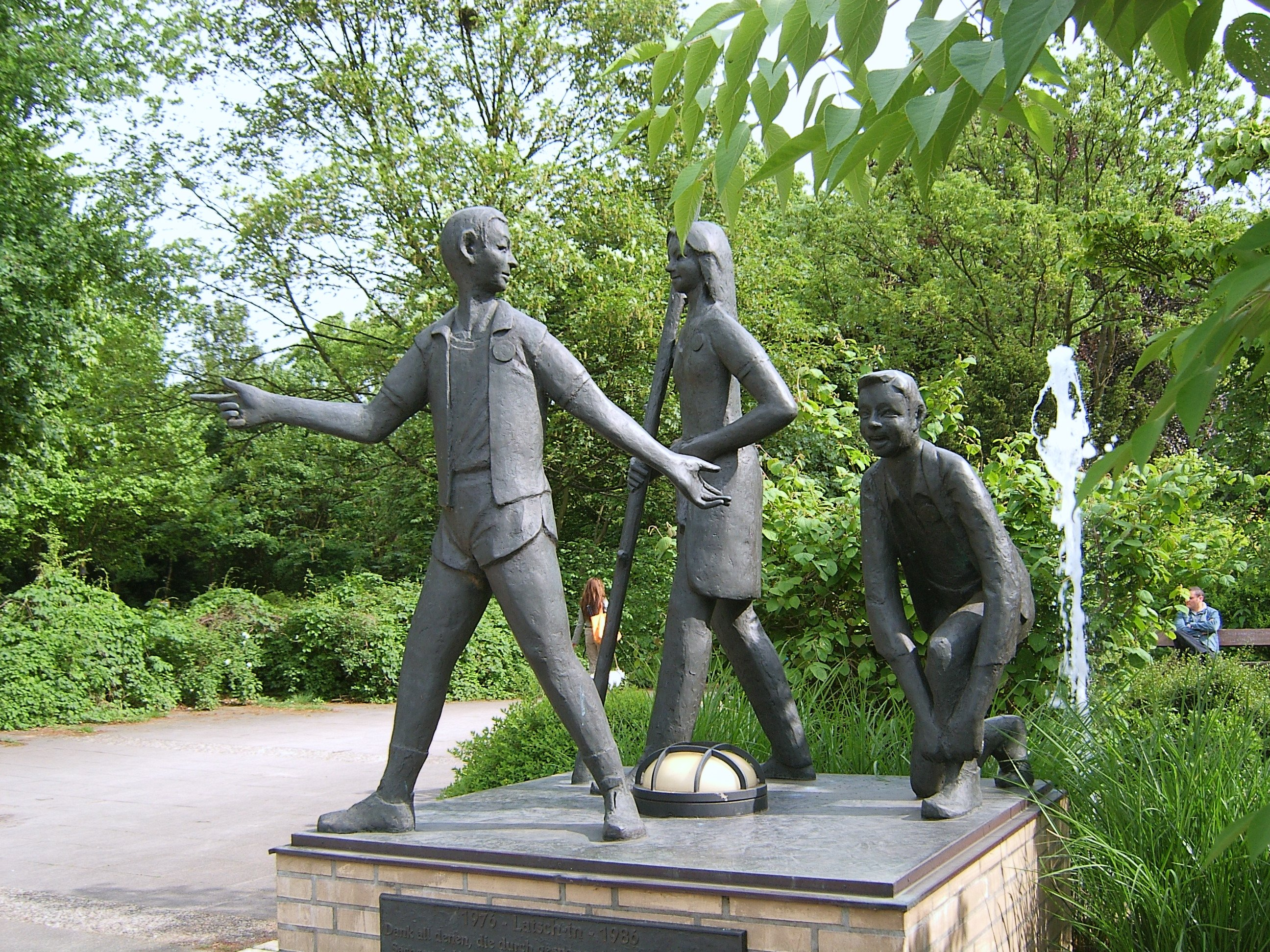 Hamburg, Eilbek, Jacobipark, vor der Osterkirche. This is a photograph of an architectural monument. Fotograf: selbst Datum: 24.5.2006